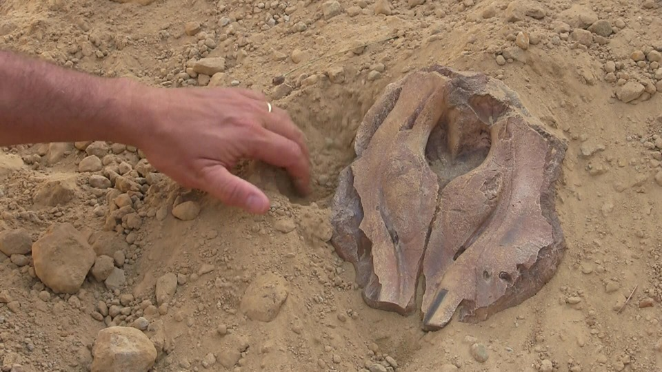 Casatia thermophila scavi